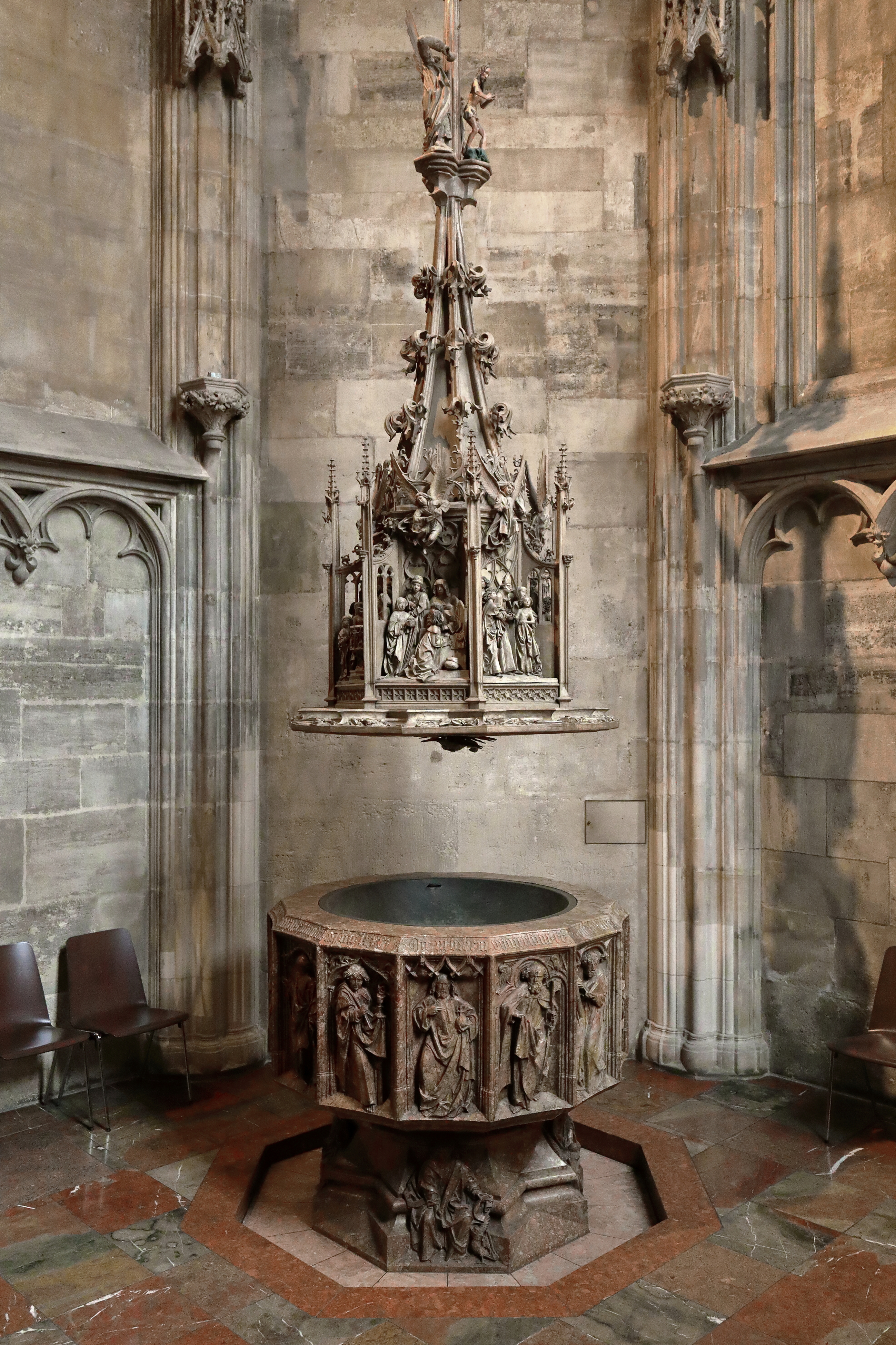 Der Taufstein in der Katharinen- bzw. Taufkapelle des Stephansdoms in der österreichischen Bundeshauptstadt Wien.Das 14-seitige Taufbecken aus rot-braunem Salzburger Marmor mit einem achteckigen Sockel wurde von 1476 bis 1481 vermutlich von dem Steinmetzen Ulrich Auer gefertigt. An dem darüber befindlichen reichgeschnitzten siebeneckigen Holzdeckel werden die sieben Sakramente dargestellt.